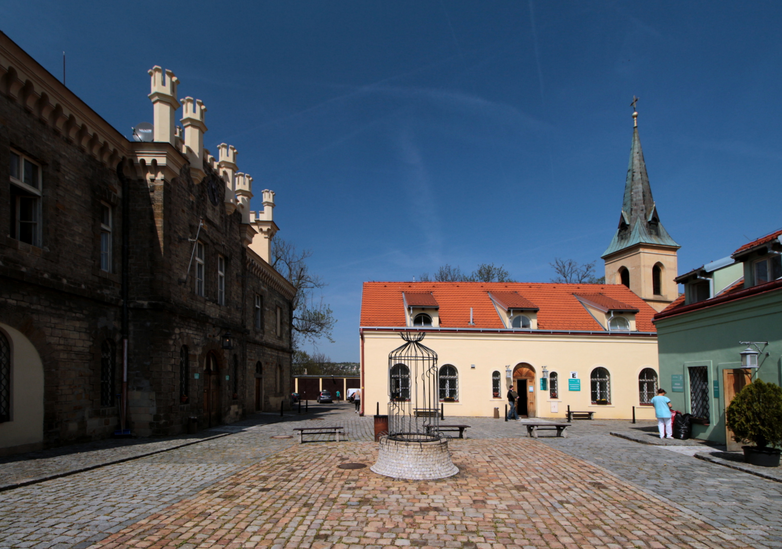 Hloubětínský zámek